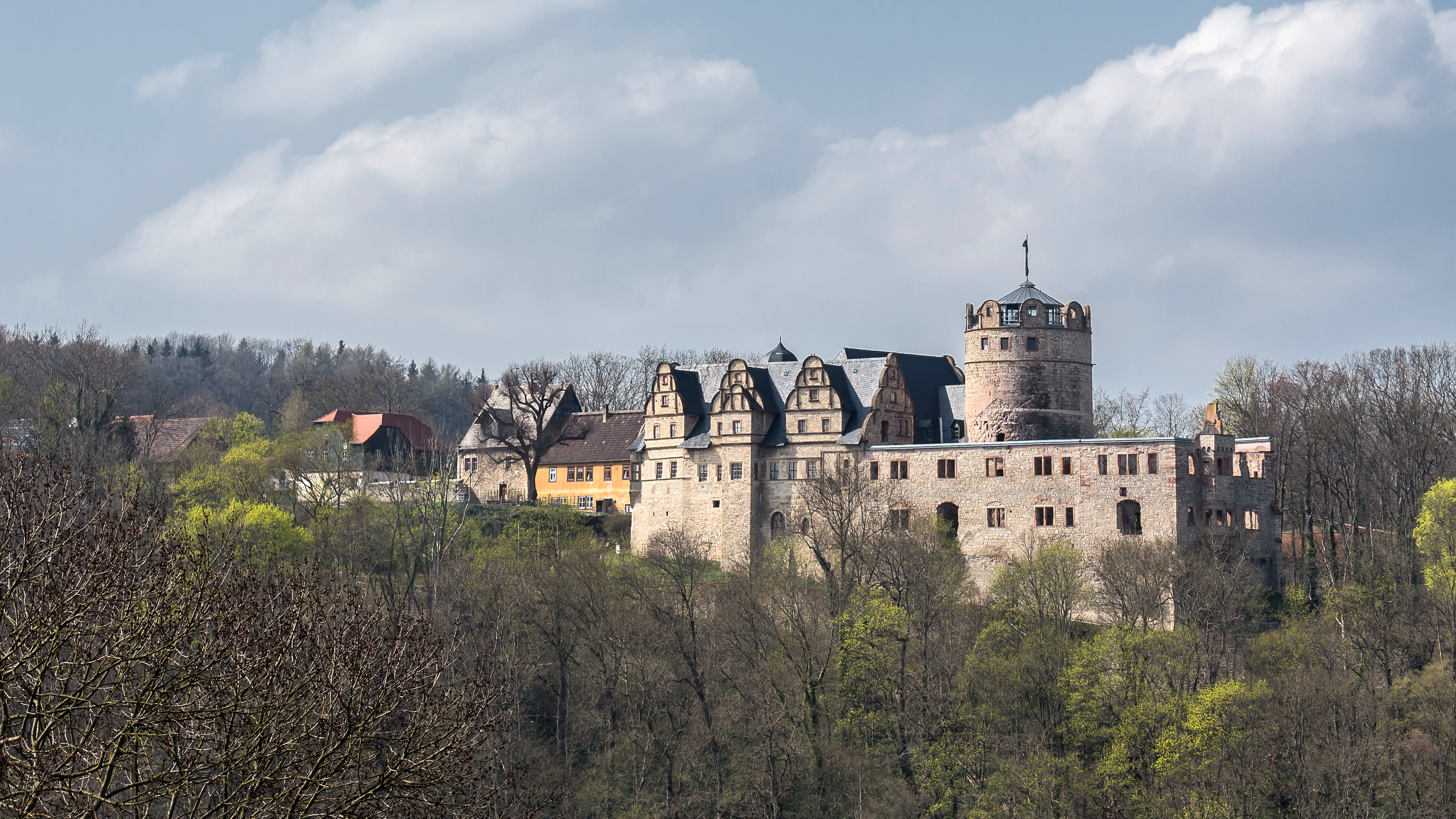 Kranichfeld Schloßberg mit Oberschloss, Amtsvogtei, Vorwerk, Nr. 28, 30, 32, 34, 36, 40